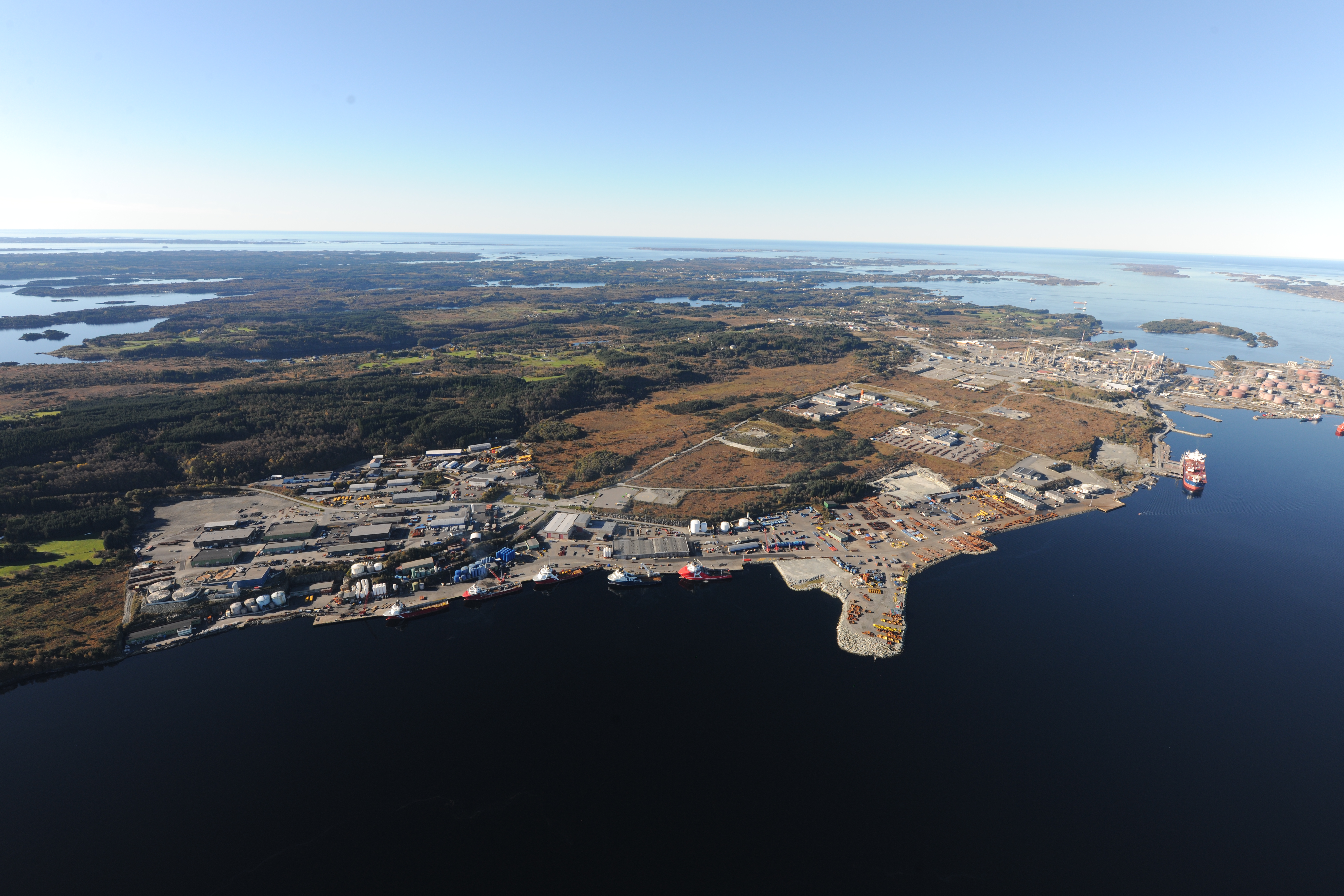 Flyfoto av Mongstad. Viser Mongstad Sør og Statoils rafeneri til høyre i bildet.